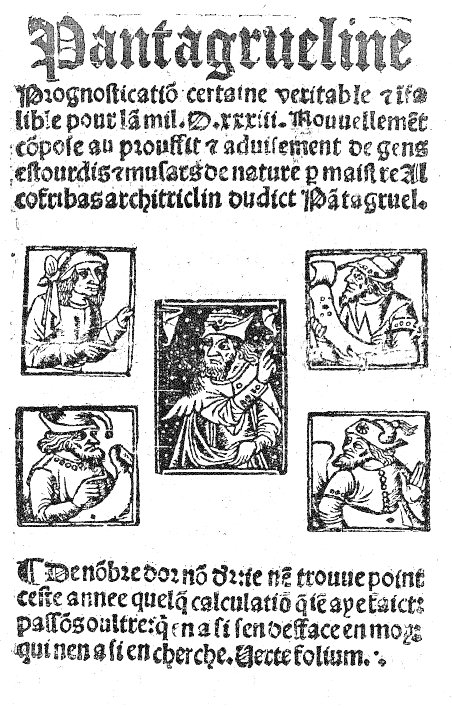 Page couverture, Pantagrueline Pronostication de François Rabelais, édition François Juste, 1532 (retouchée) Cover of Pantagrueline Prognostication by François Rabelais, published by François Juste, 1532 (retouched)